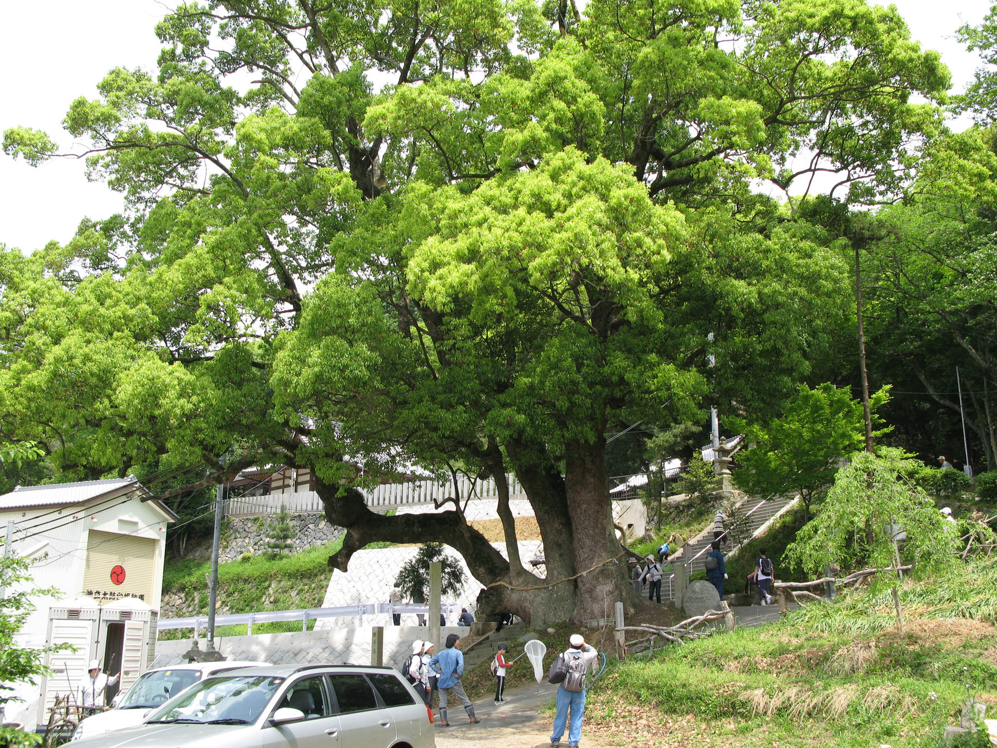 Tamaoya Shrine in Yao, Osaka, Japan